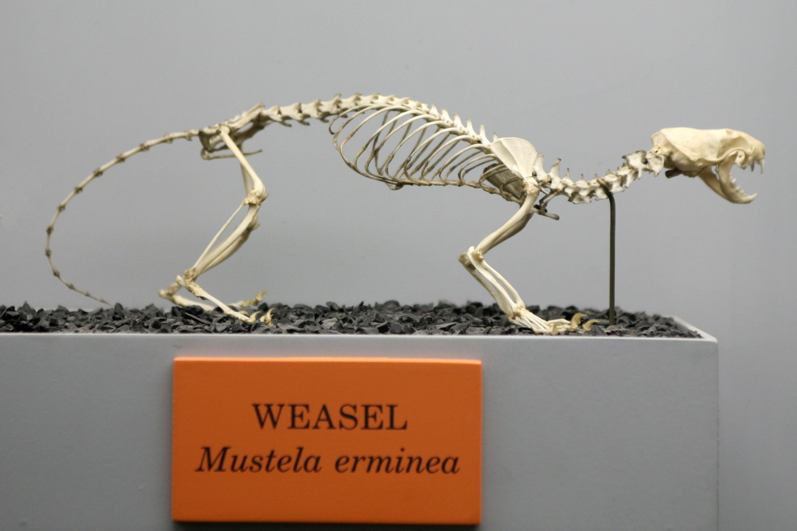 Weasel (mustela erminea)